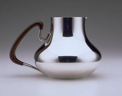 henning koppel pitcher jensen